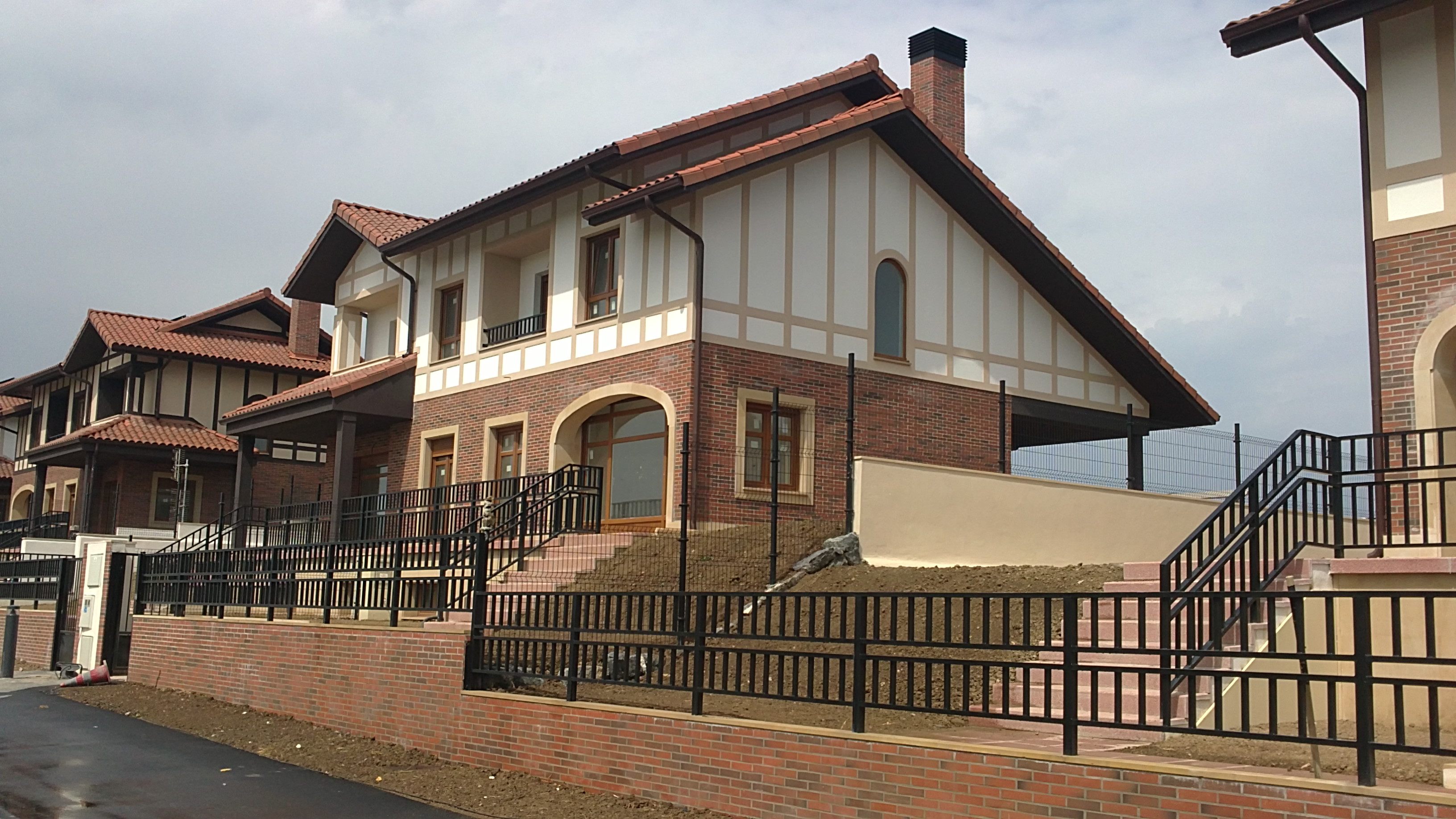 Viviendas en Sopelana